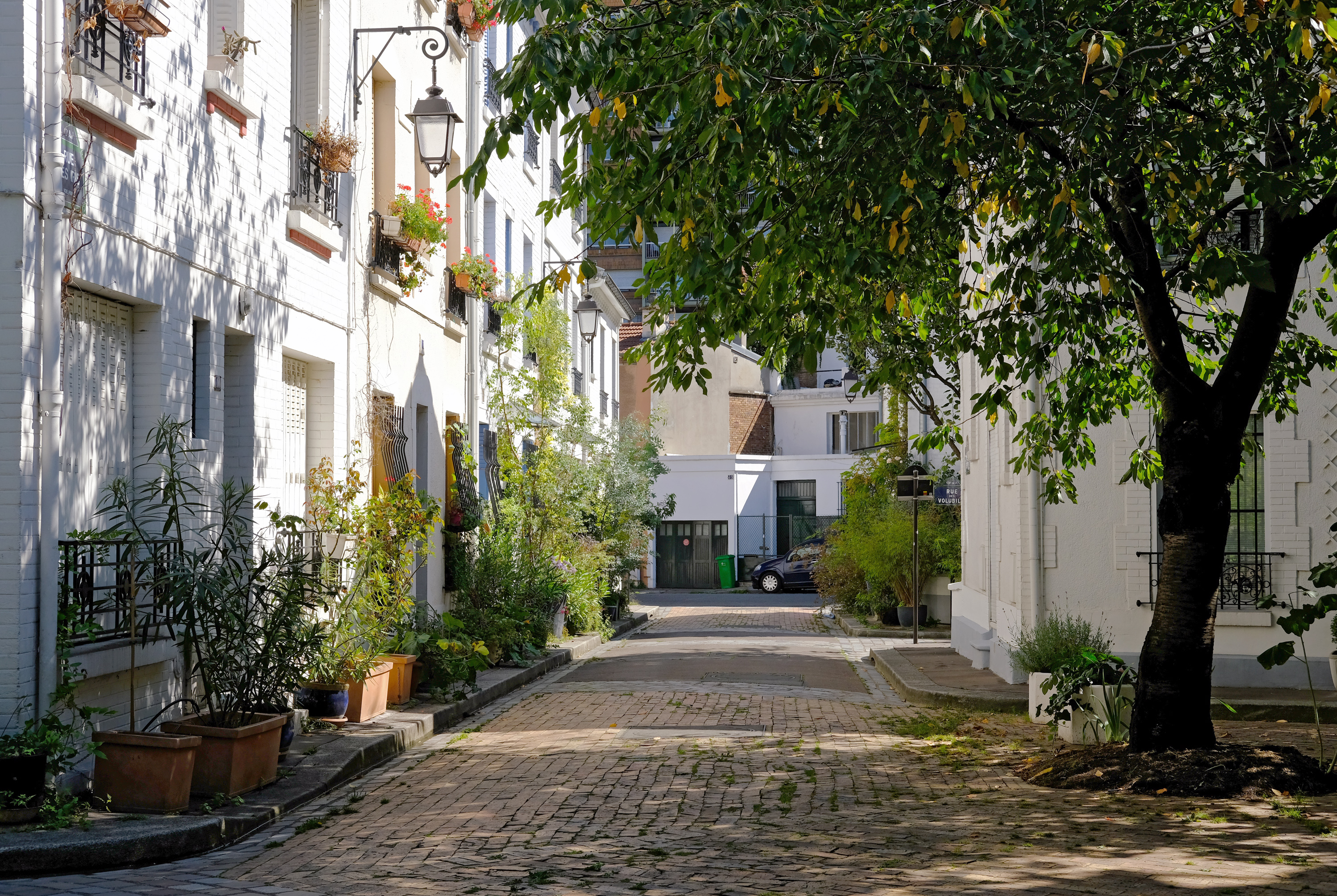 Cité florale (rue des Iris) - Paris XIII